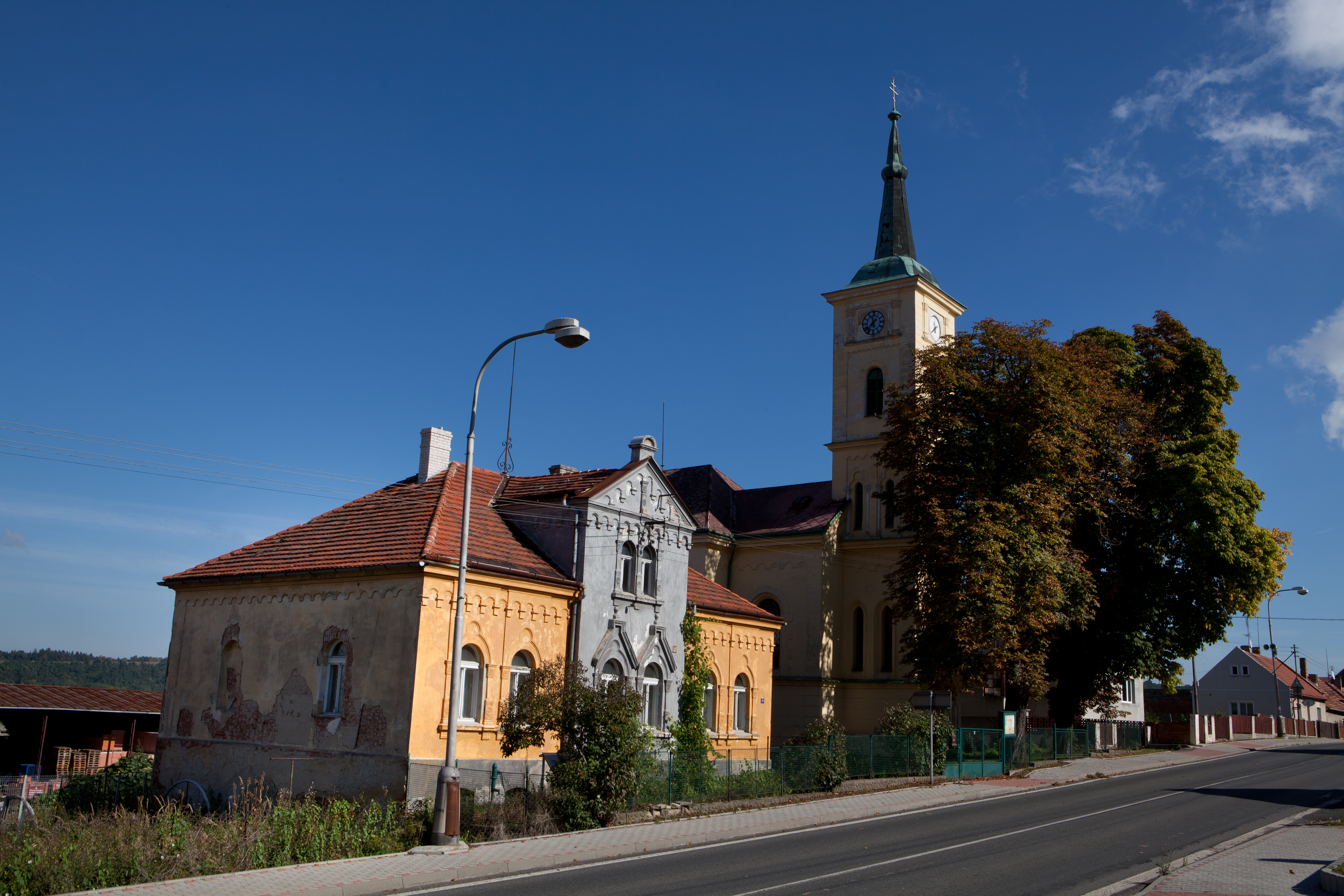 Kostel pravoslavný sv. Cyrila a Metoděje s farou (Hořovičky), při silnici Praha - Karlovy Vary, Hořovičky